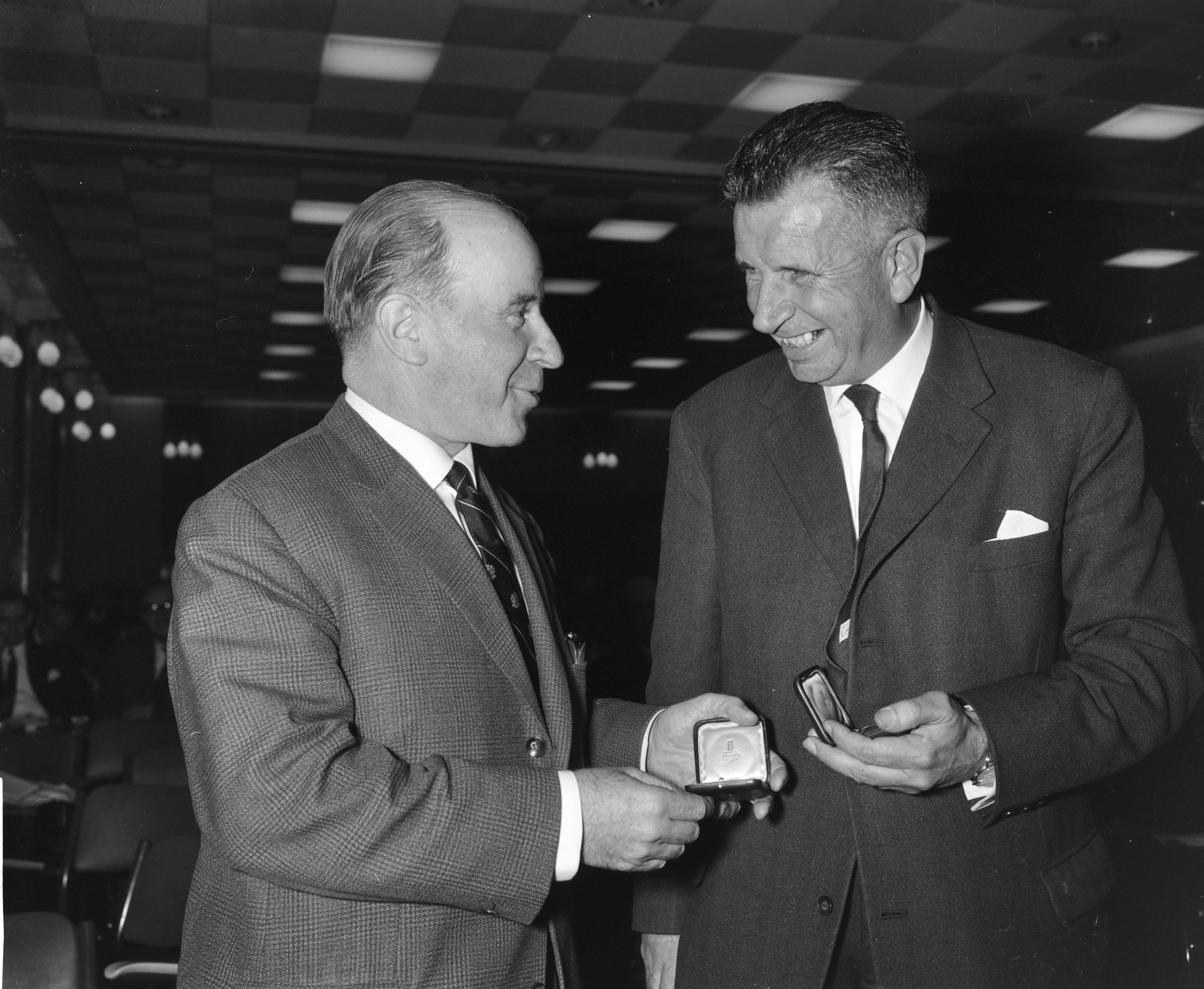 Collectie / Archief : Fotocollectie Anefo Reportage / Serie : [ onbekend ] Beschrijving : Bondsvergadering KNVB in Krasnapolski. J. L. Melchers (Ajax) en Kieboom (Feyenoord) Datum : 28 oktober 1961 Persoonsnaam : J. L. Melchers, Kieboom Instellingsnaam : Feyenoord Fotograaf : Bilsen, Joop van / Anefo Auteursrechthebbende : Nationaal Archief Materiaalsoort : Negatief (zwart/wit) Nummer archiefinventaris : bekijk toegang 2.24.01.04 Bestanddeelnummer : 913-1109